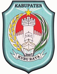 Lambang kabupaten Kubu Raya